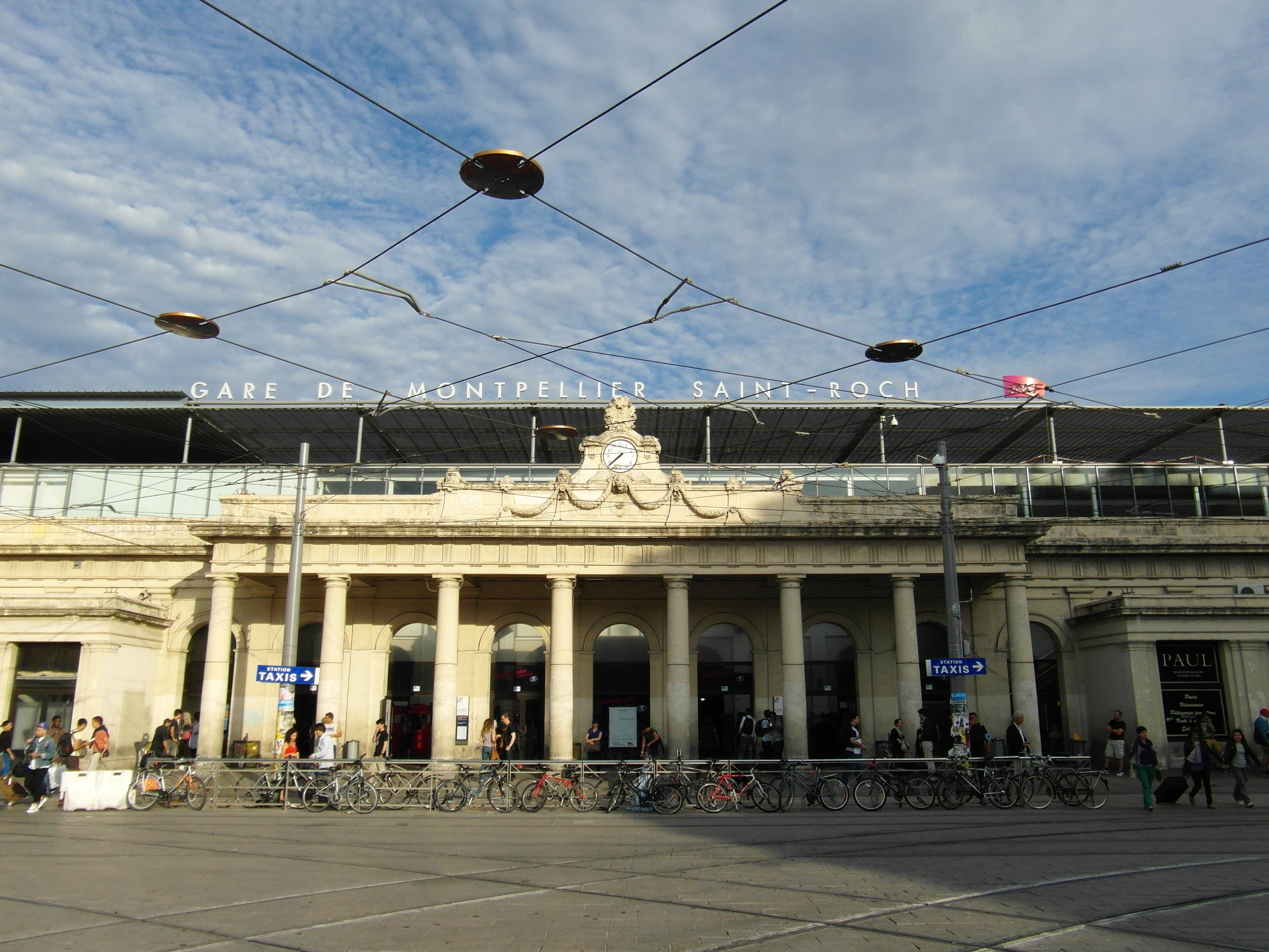 Der Hauptbahnhof von Montpellier